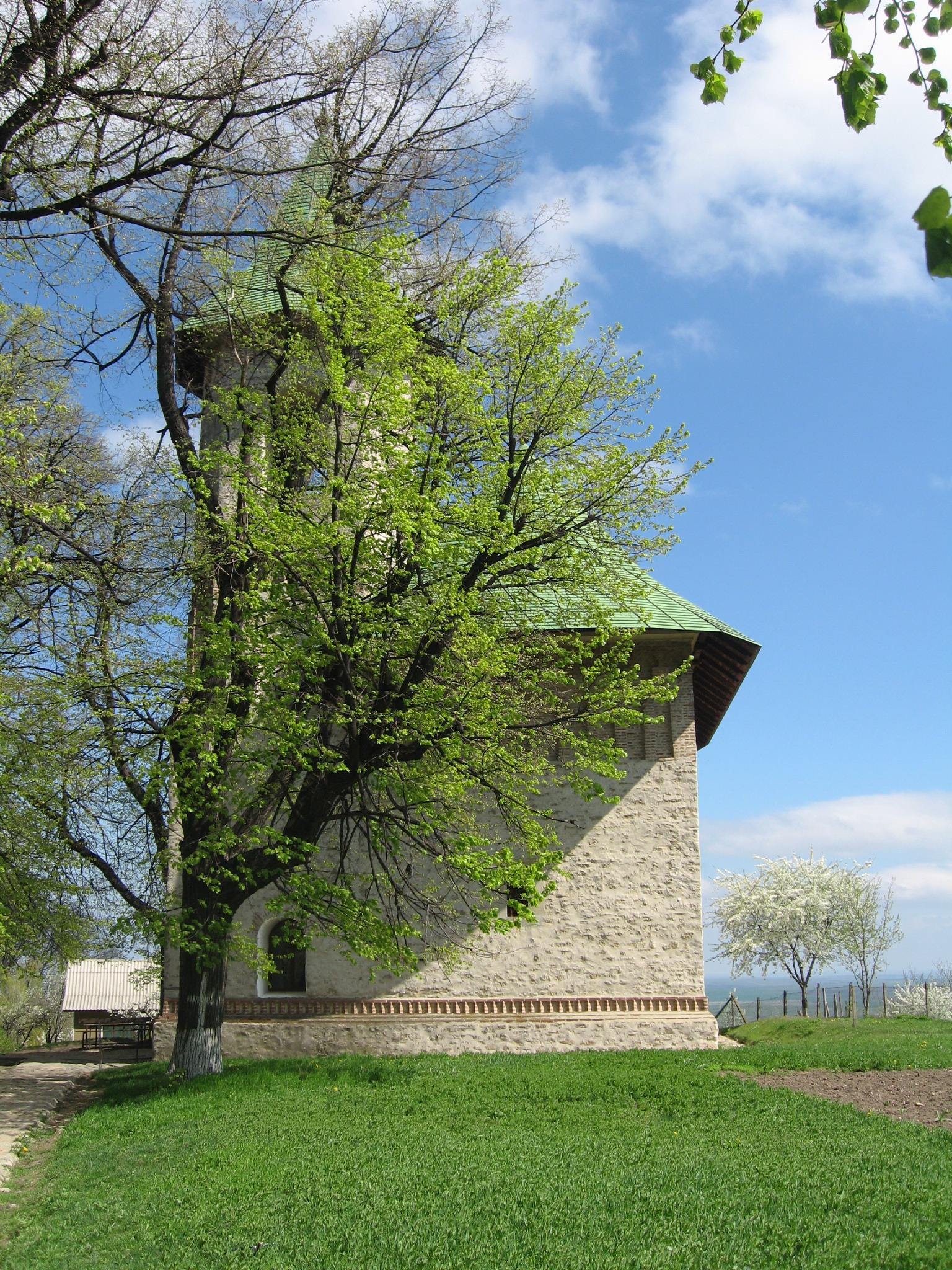 Biserica Adormirea Maicii Domnului din Deleni